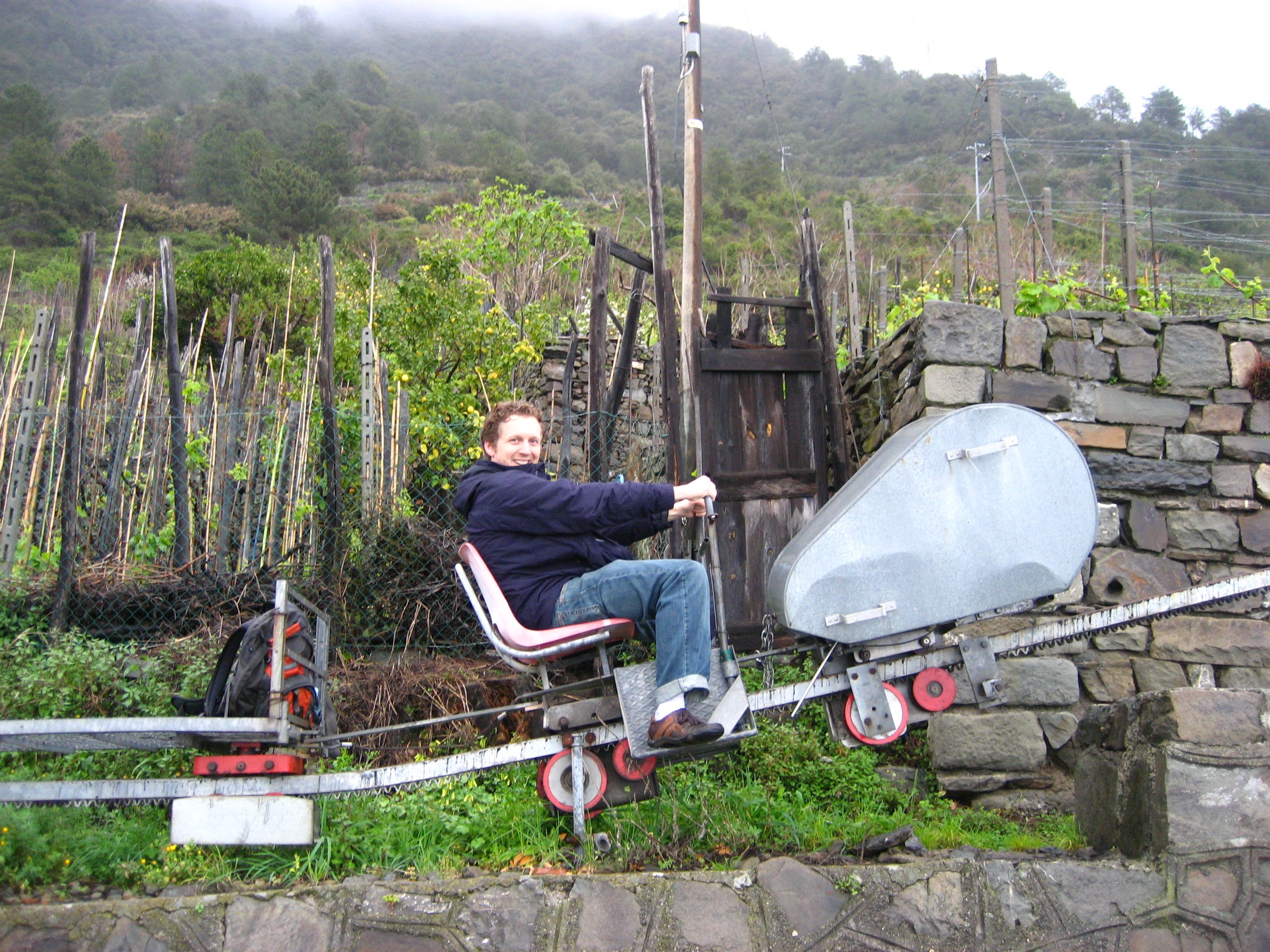 Train à crémaillère des Cinque Terre